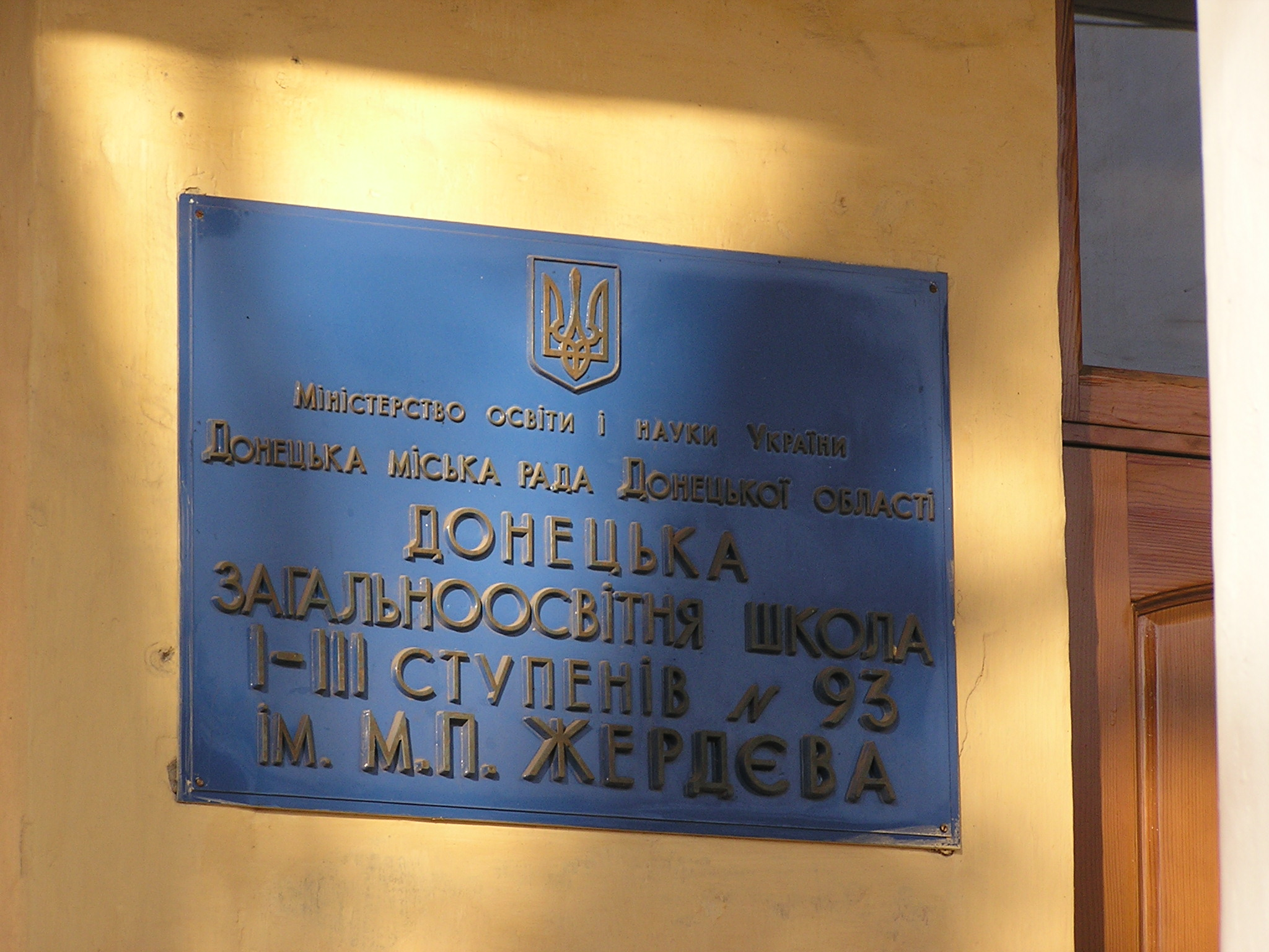 69 школа в Донецке имени Жердева